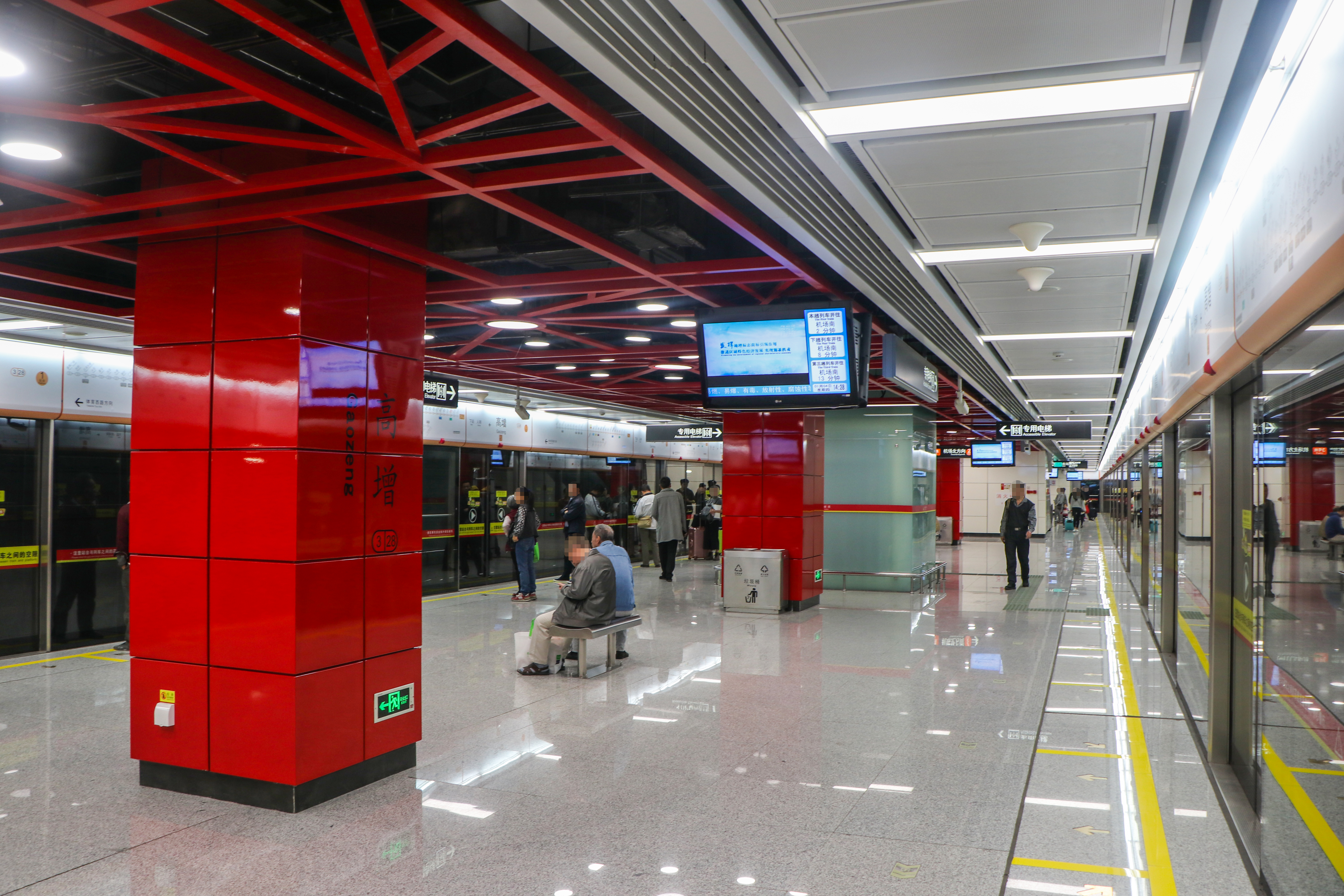 广州地铁高增站